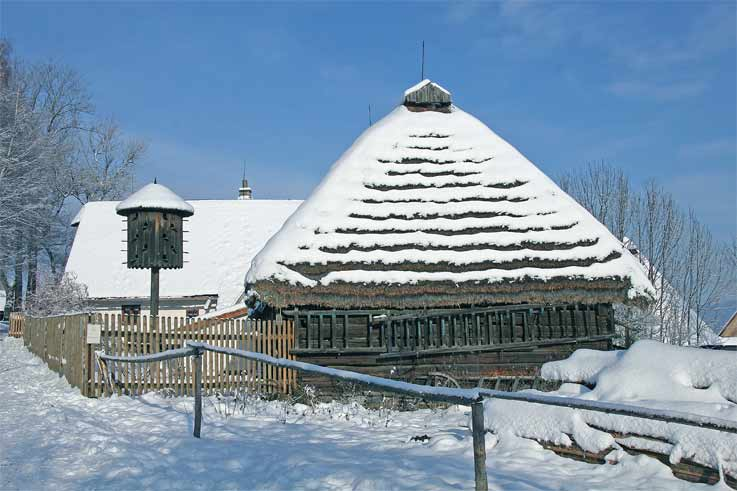 Skanzen Veselý kopec - usedlost Pilných v zimě.